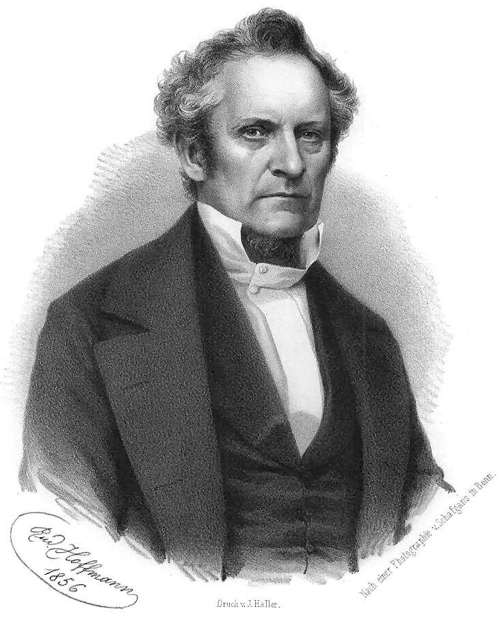 Porträt des Julius Plücker. Lithographie von Rudolf Hoffmann, ca. 1840. Nach einer Photographie von Schafgans in Bonn.